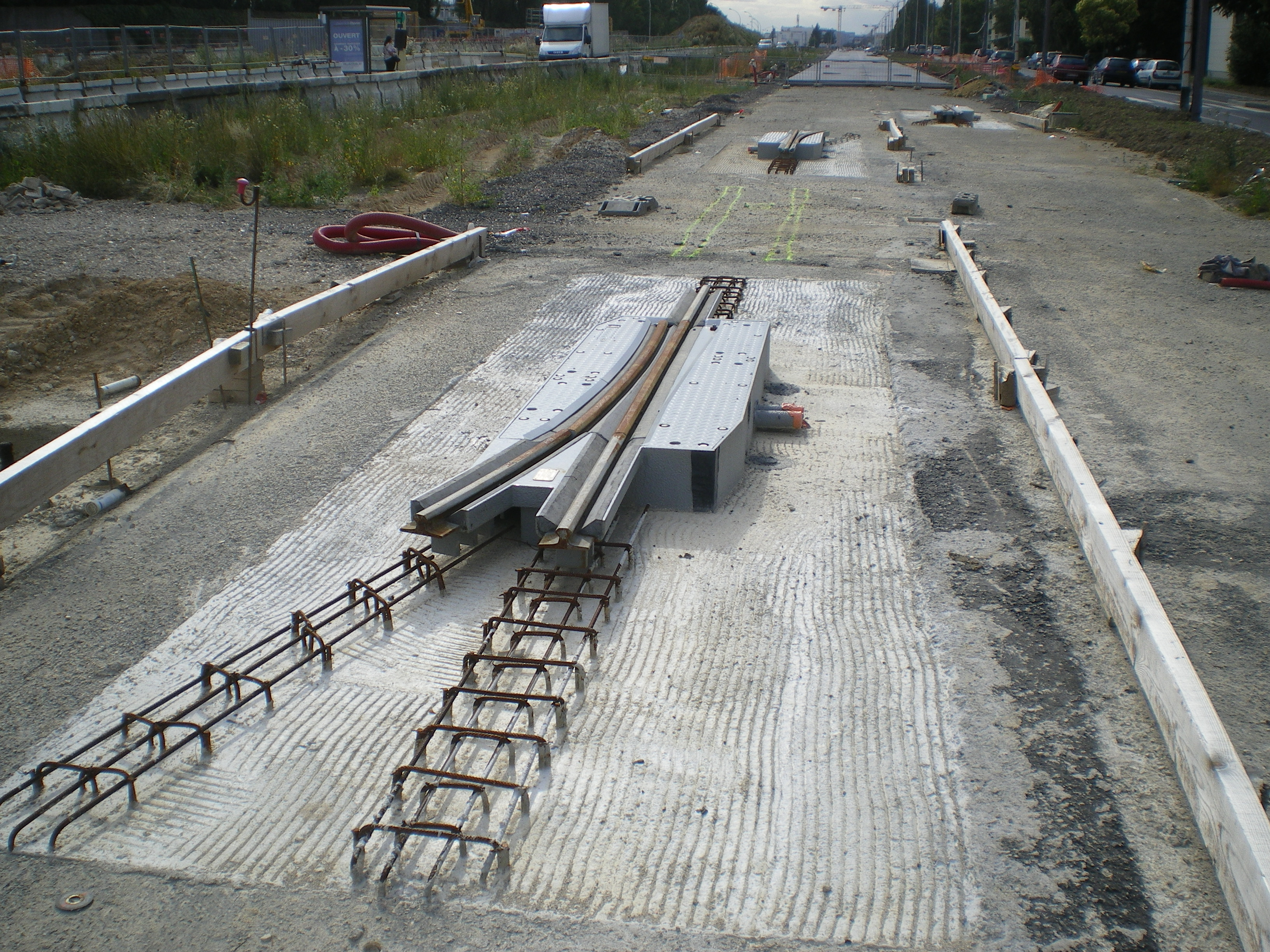 Travaux du tramway T6 - Vélizy - Avenue de l'Europe - Aiguillage - Lot 35